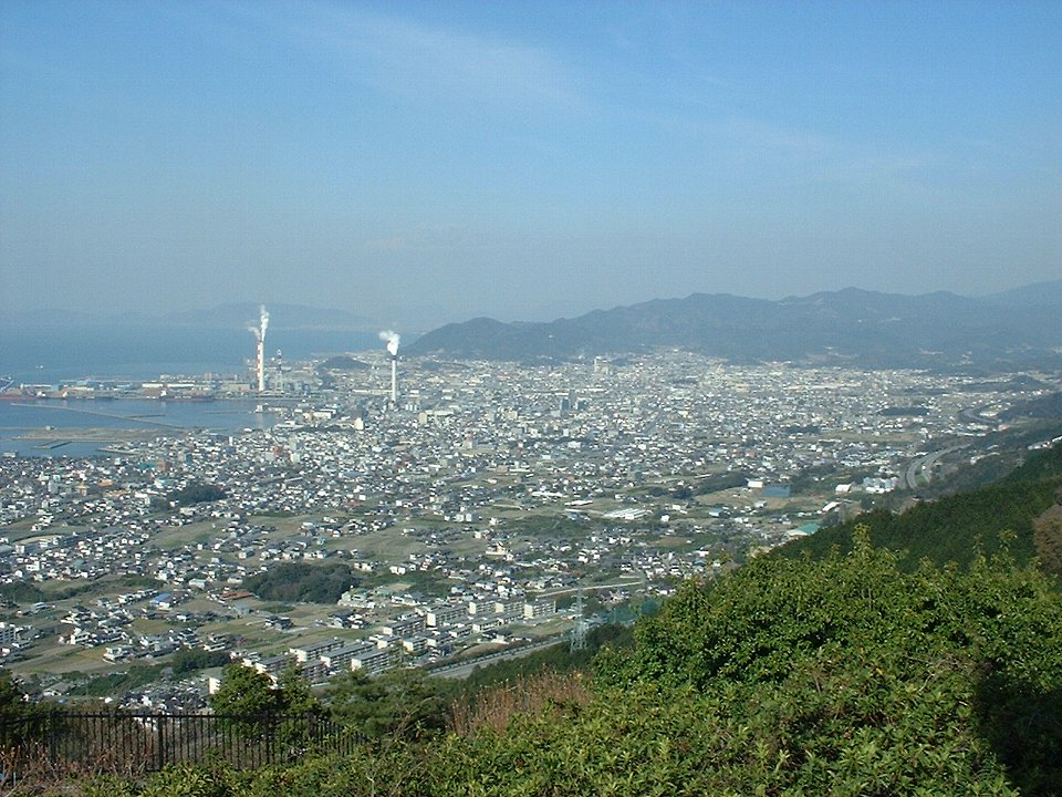 翠波峰北麓、国道319号から伊予三島（手前）・川之江市街（撮影当時。現・四国中央市）を望む